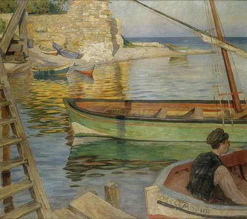 Кеят на Месемврия